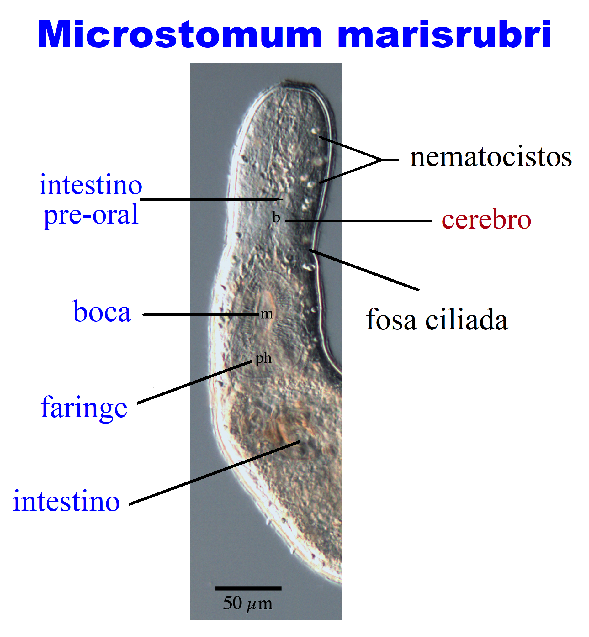 M. marisrubri. Aparato digestivo (en azul a la izquierda)